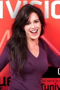 Couverture du numéro 95 du magazine tunisien Tunivisions.